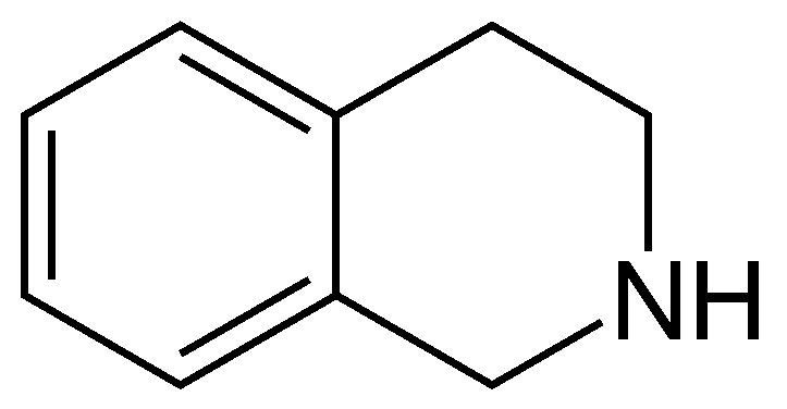 Tetrahydroisoquinoline